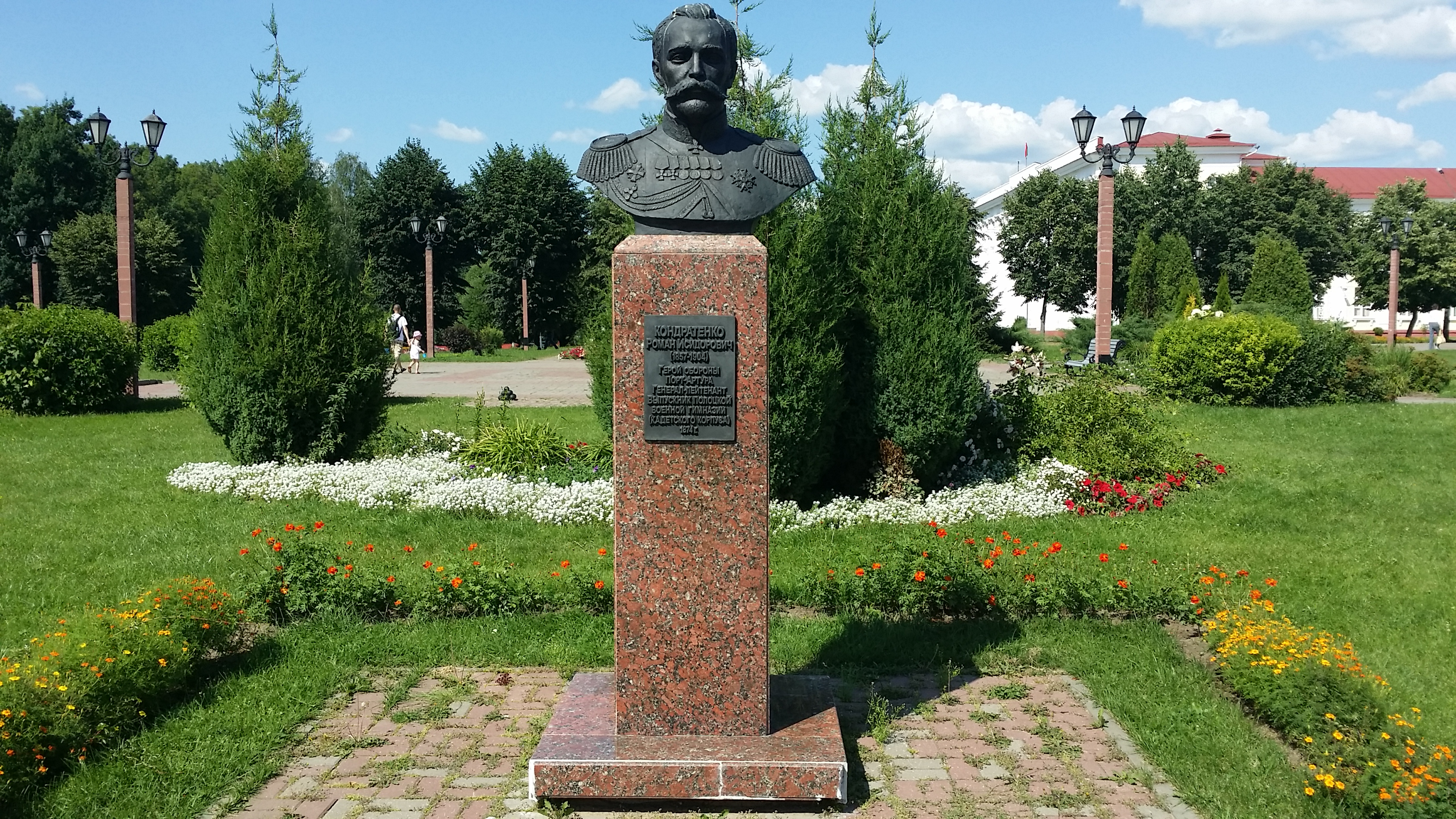 Бюст Р. И. Кондратенко в Полоцке